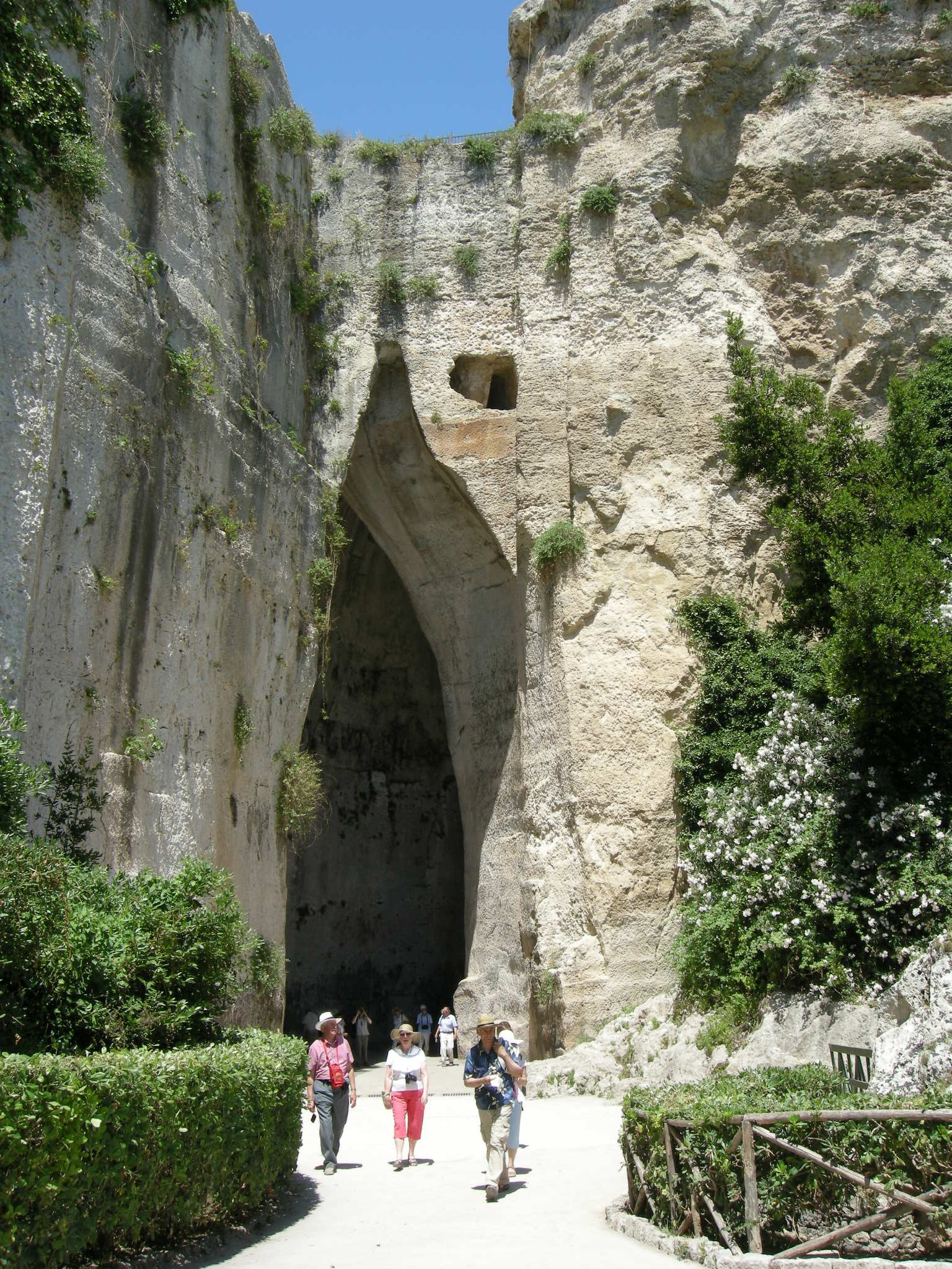 Siracusa, neapolis, latomia dell'orecchio di dioniso